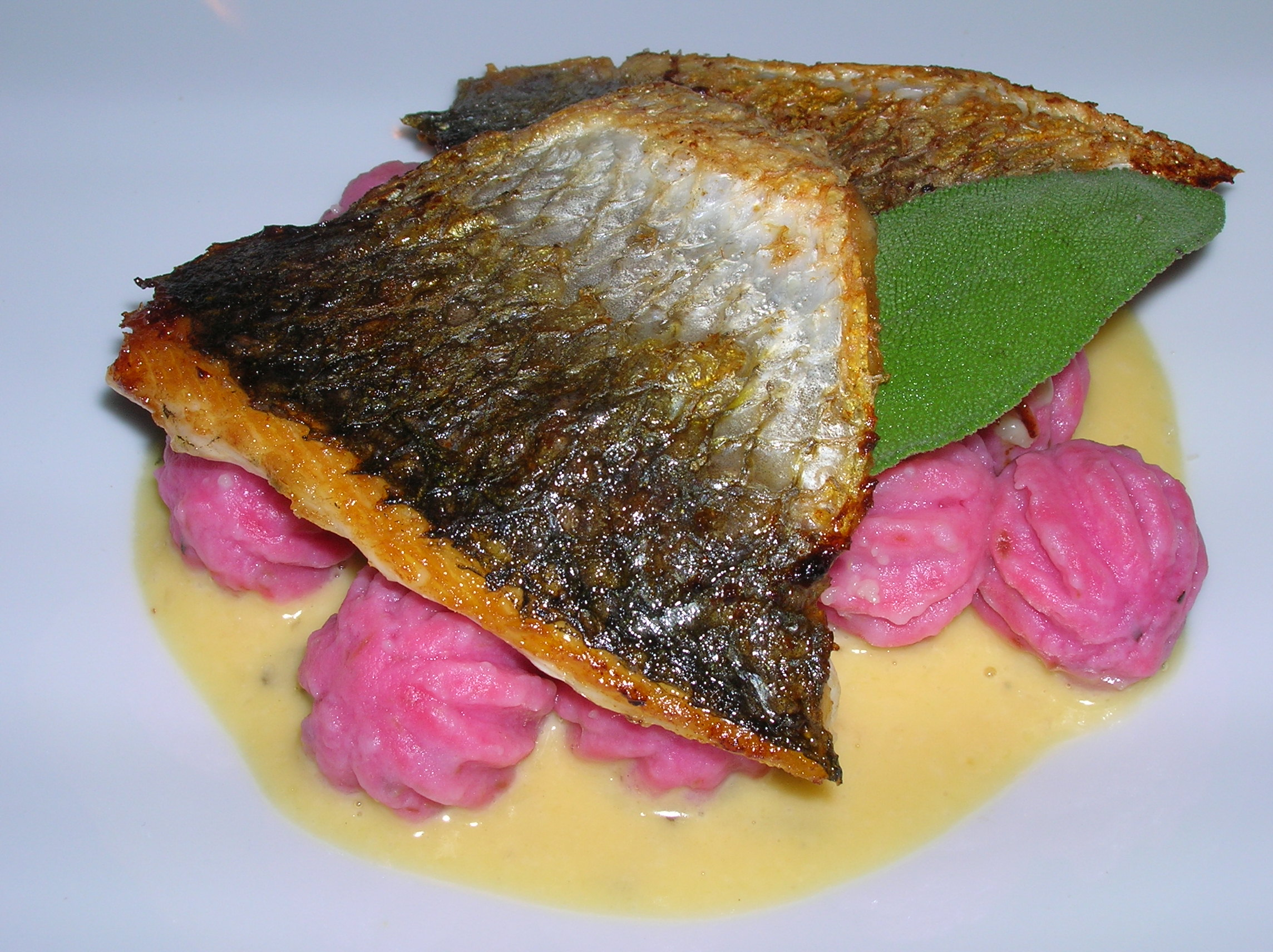 Green Mullet in Chloelys